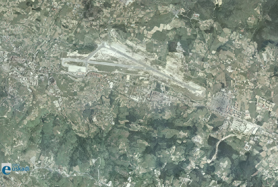 Bilboko aireportuaren ortoargazkia